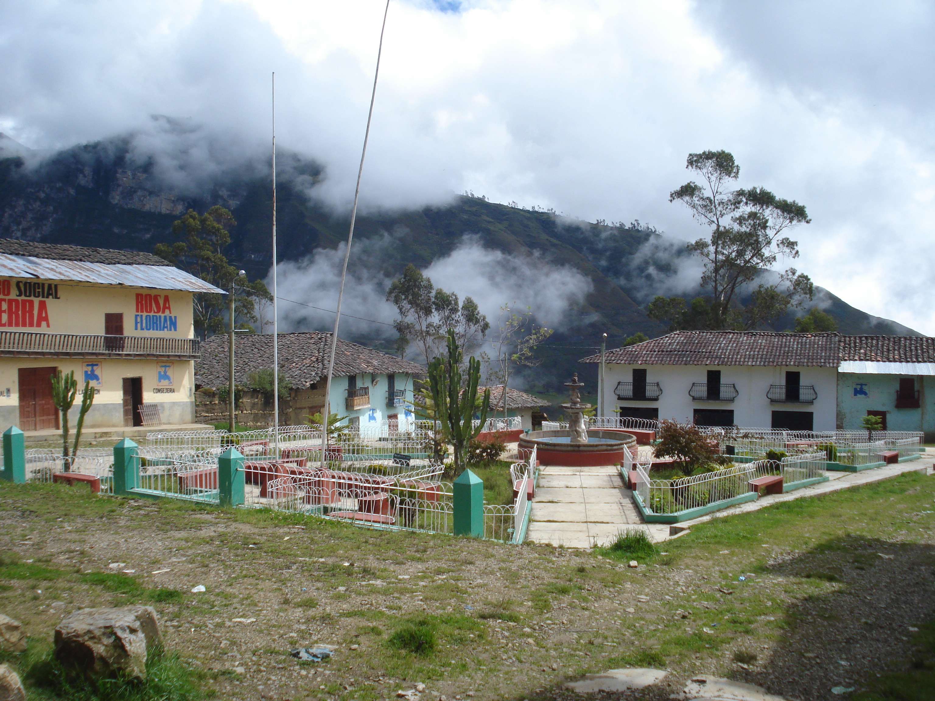 Parque en el centro poblado de Salacat, distrito de Sorochuco, Provincia de Celendín, Región Cajamarca